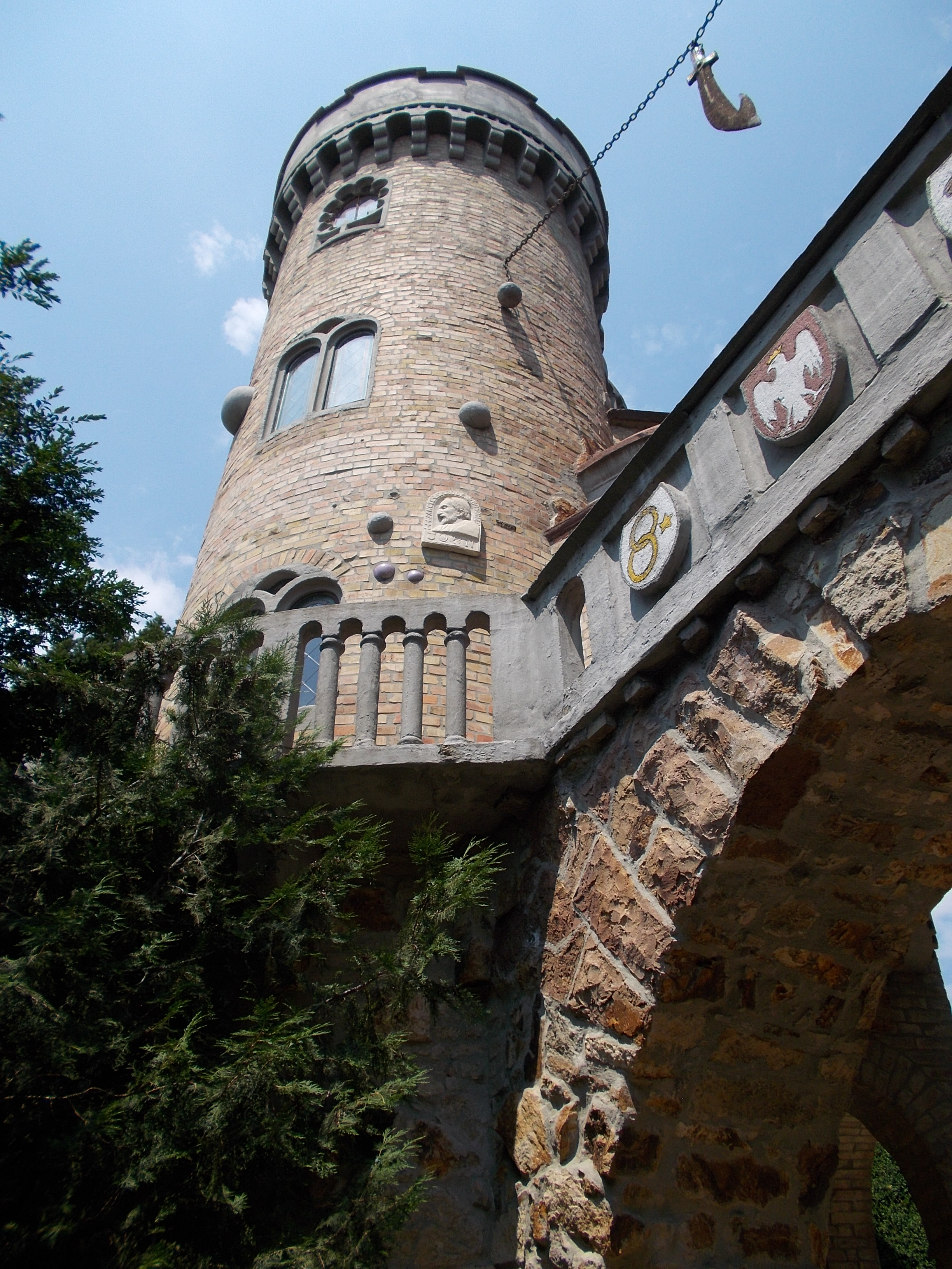 Bory vár. Kaputorony. Pajzsok címerekkel. - Magyarország, Fejér megye, Székesfehérvár, Öreghegy, Máriavölgy út 54